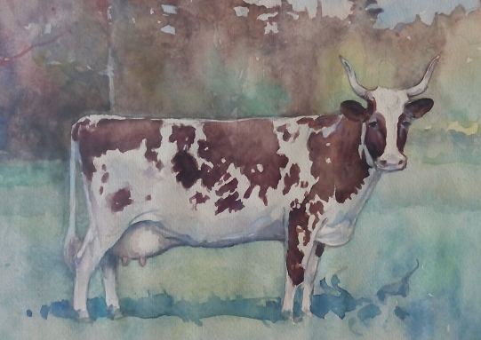 Mrs Mott Howie maljan voittaja 1936